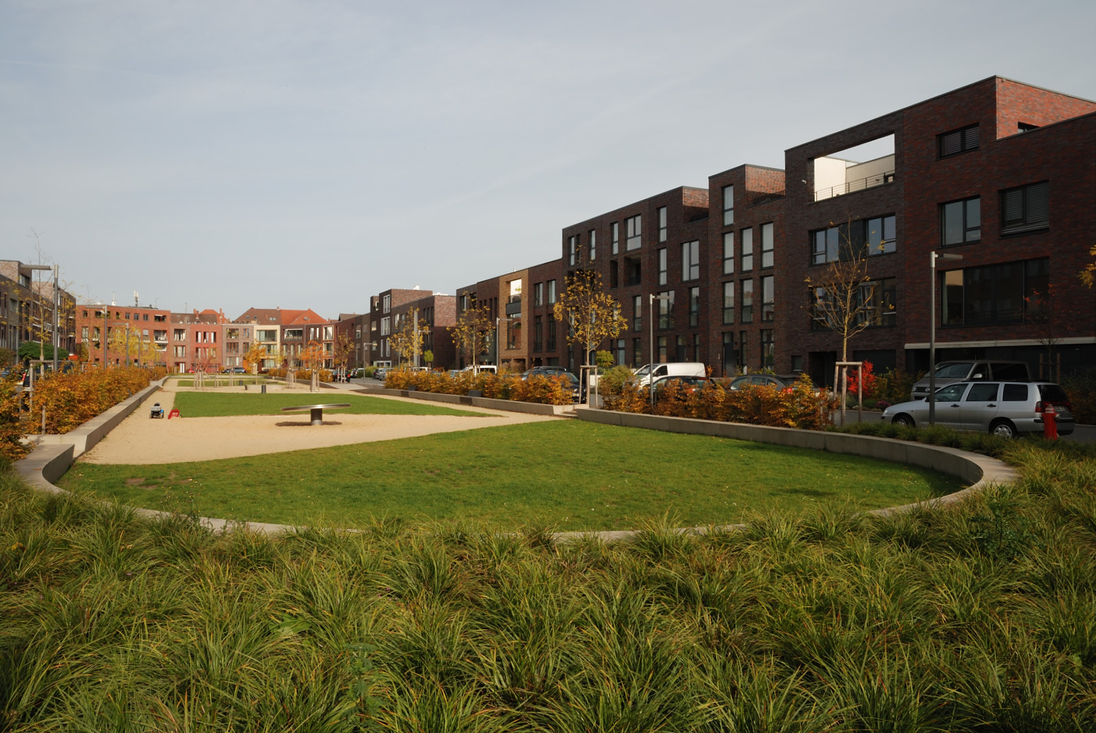 Braunschweig, Straße St.-Leonhards-Garten, Blick von Süden nach Norden, Oktober 2015